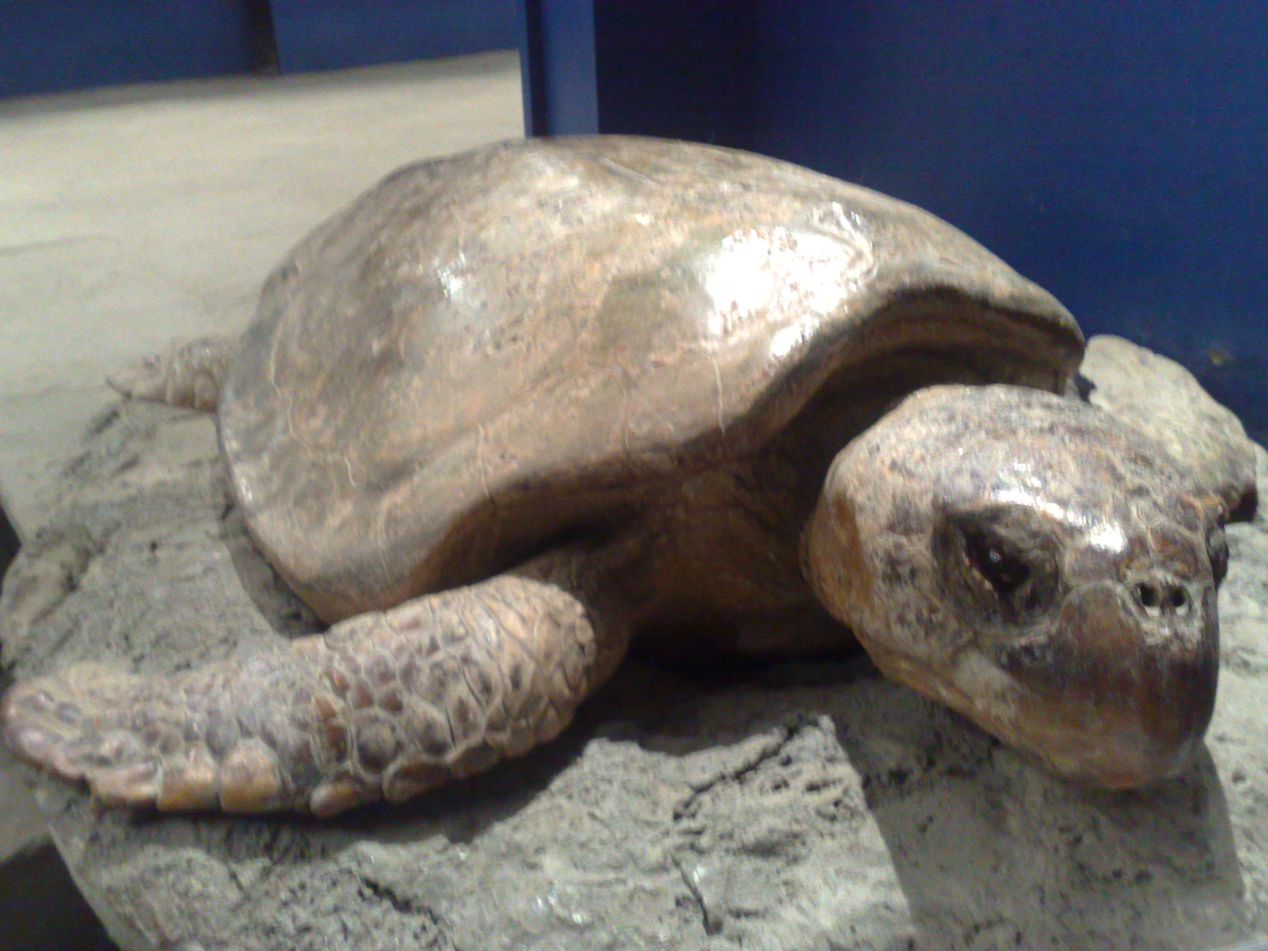 Tartaruga marina imbalsamata dell'acquario di Napoli Anton Dohrn.